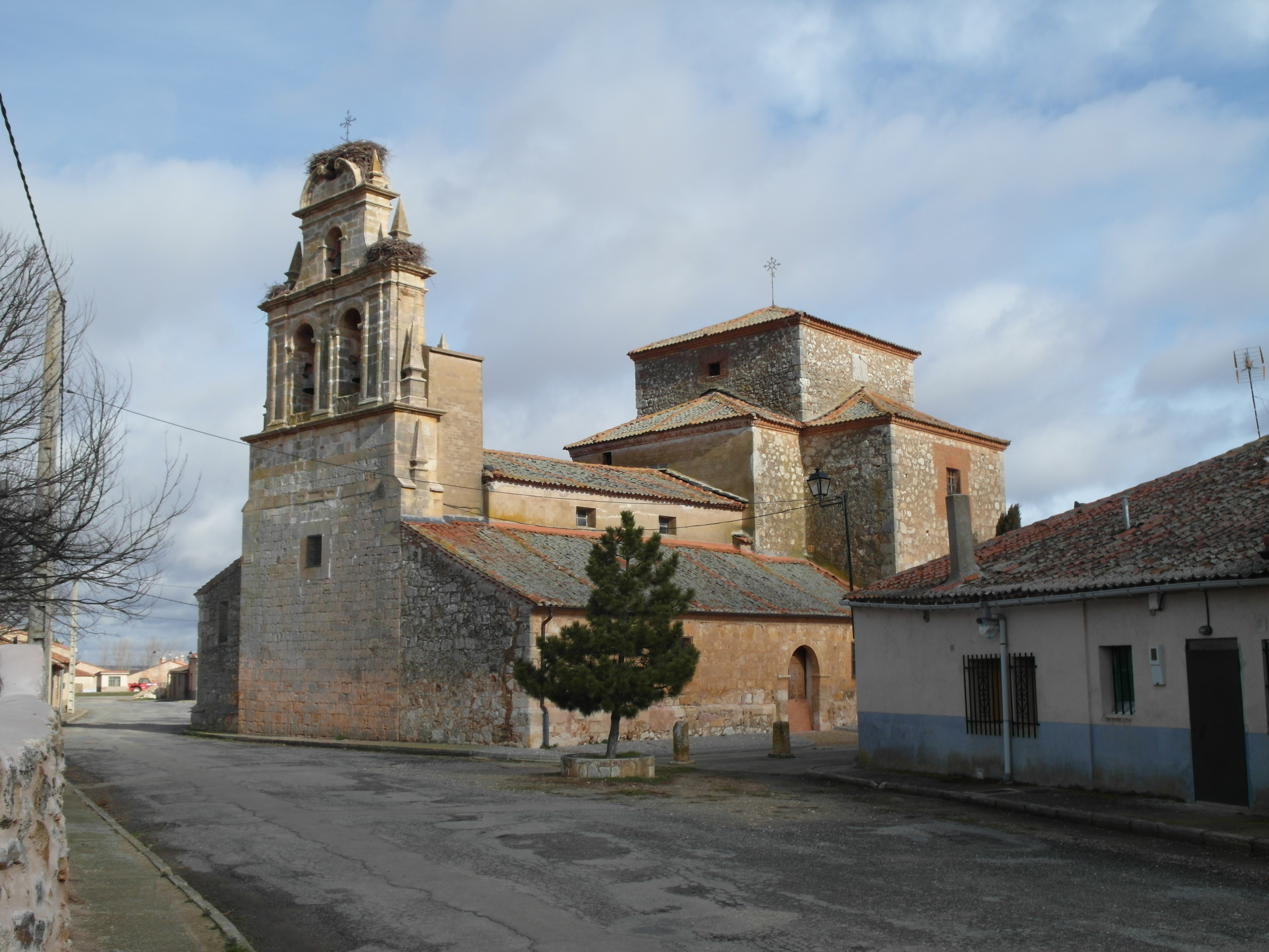 Cascajares, Segovia.